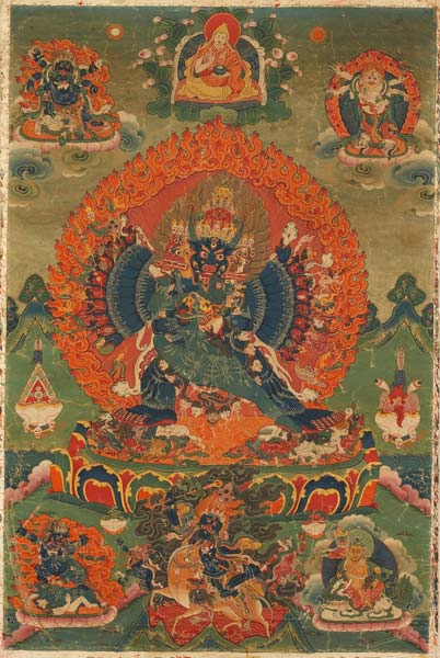 18世紀新勉派作品，來源：[1][2]